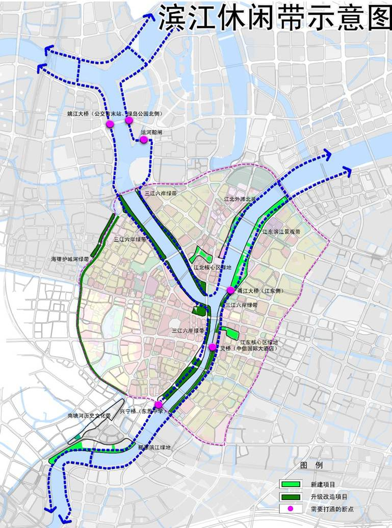 宁波三江六岸滨江休闲带系统范围